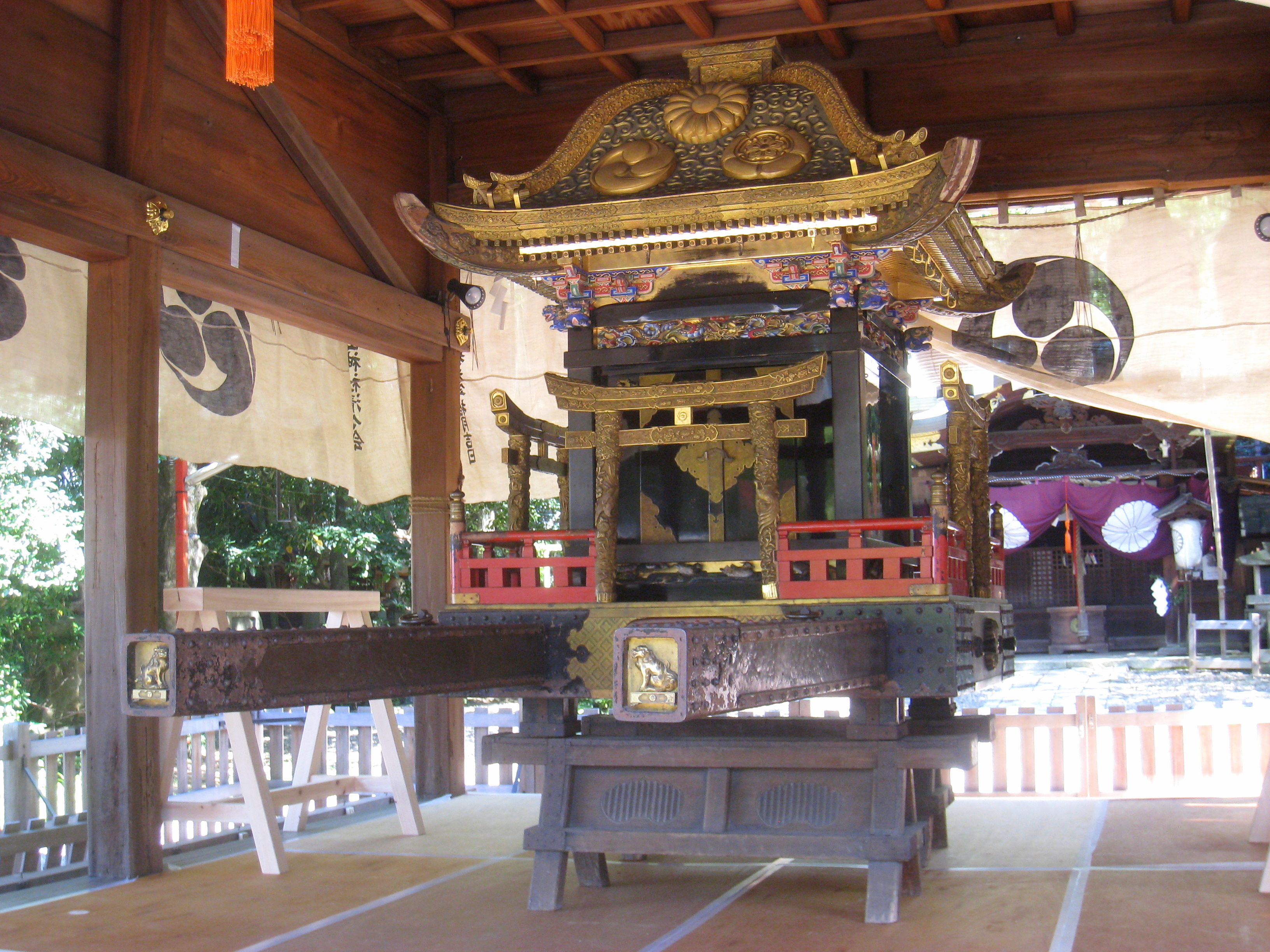 Awata-jinja (Awata Shrine), Kyoto, Japan.